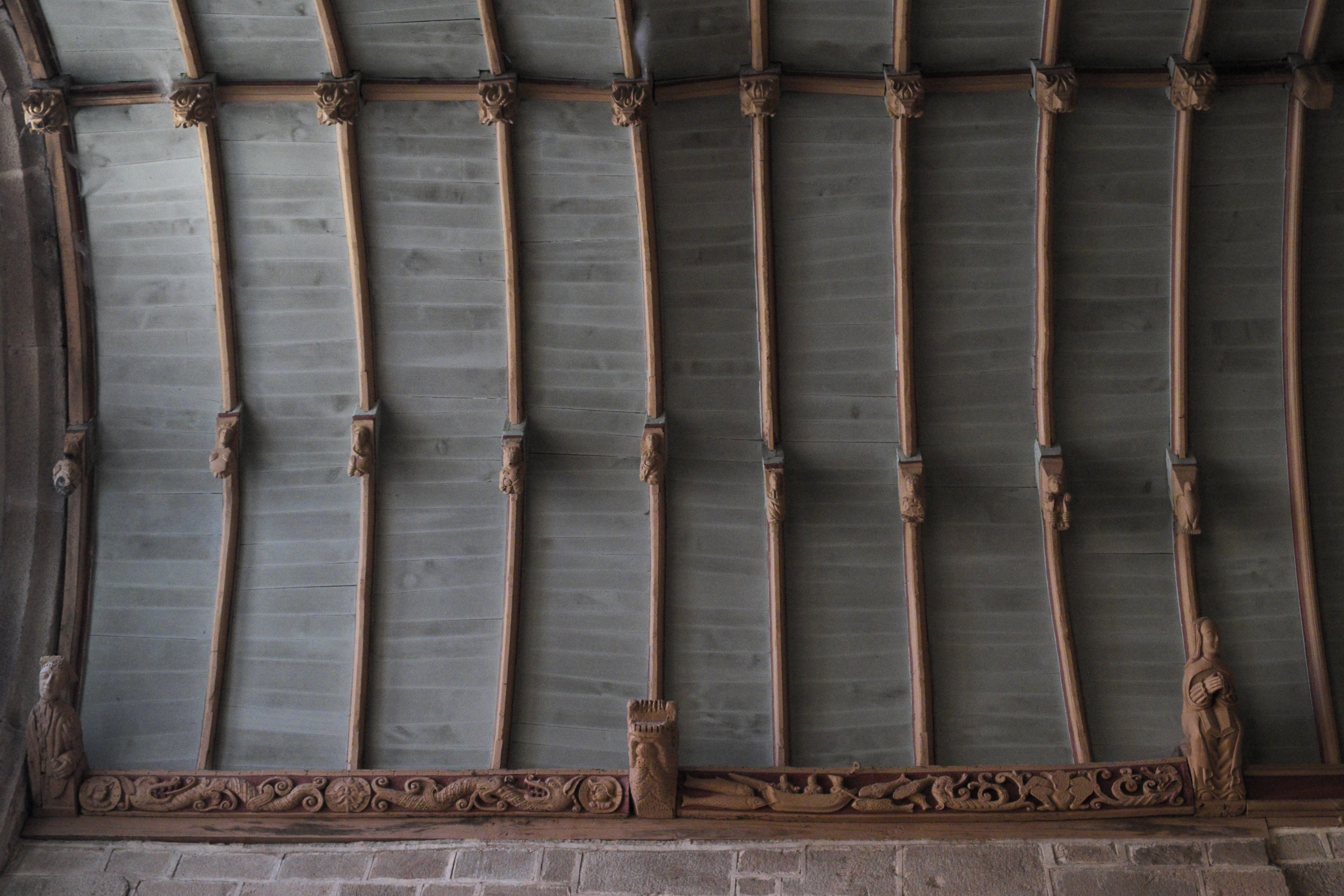 Ehemalige Stiftskirche Notre-Dame-de-Roscudon in Pont-Croix im Département Finistère (Region Bretagne/Frankreich), Holzdecke